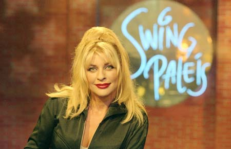 Manuela Kemp in Het Swingpaleis